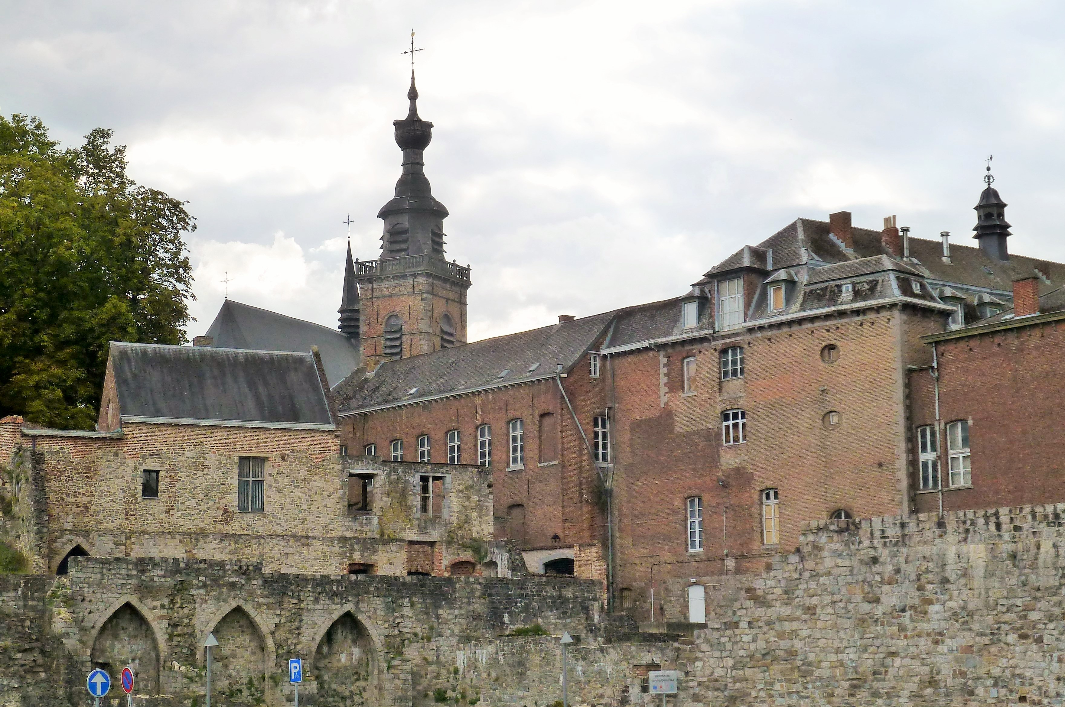 Les Anciens remparts de Binche sont un monument d'architecture militaire de Belgique relevant du Patrimoine majeur de Wallonie.